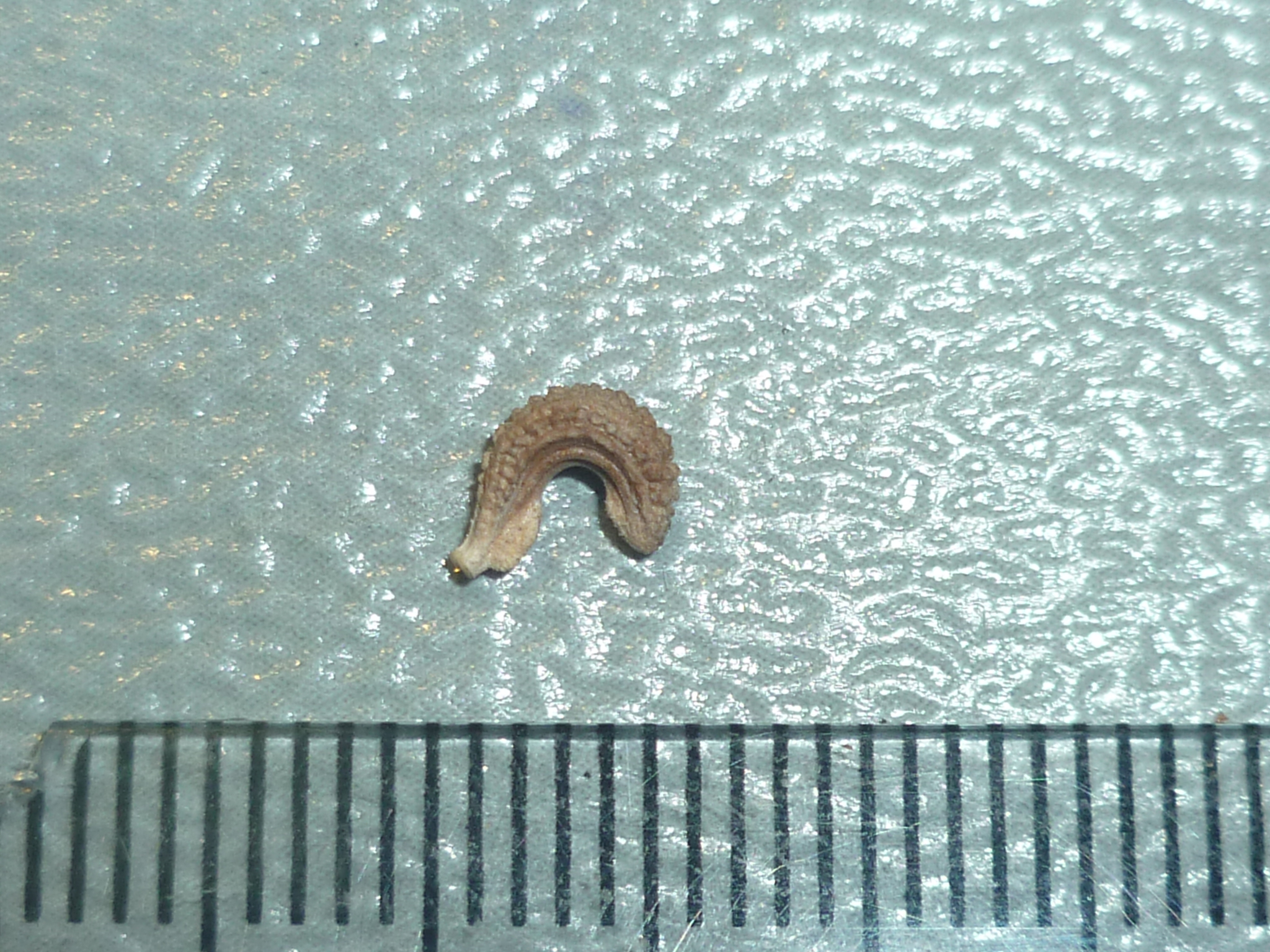 akène centrale de calendula officinalis